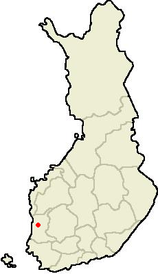 Noormarkun sijainti